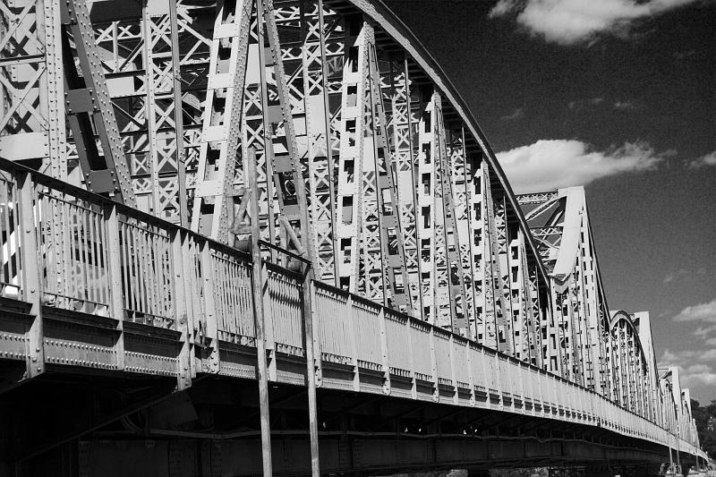 Most im. Ignacego Mościckiego w Puławach. Widok od strony południowo-zachodniej.